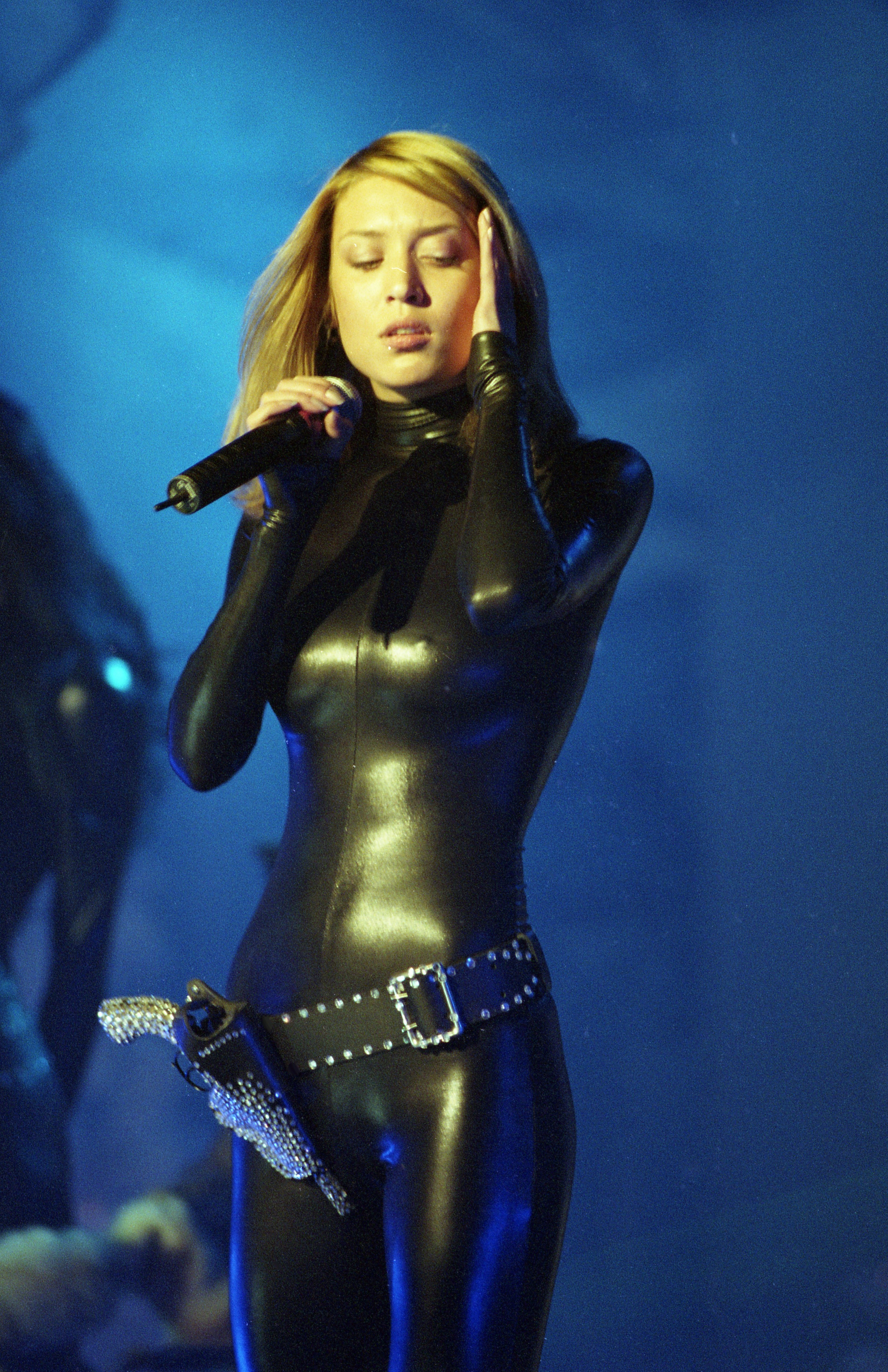 Алёна Винницкая в составе группы ВИА Гра на съёмках Рождественских встреч в декабре 2001 года